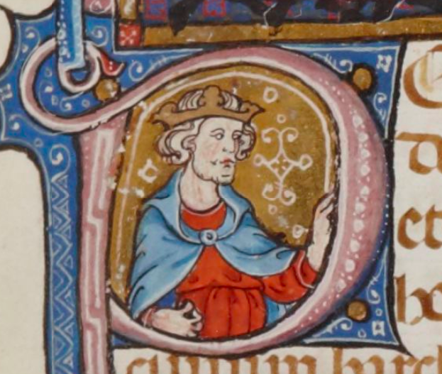 Petr III. Aragonský